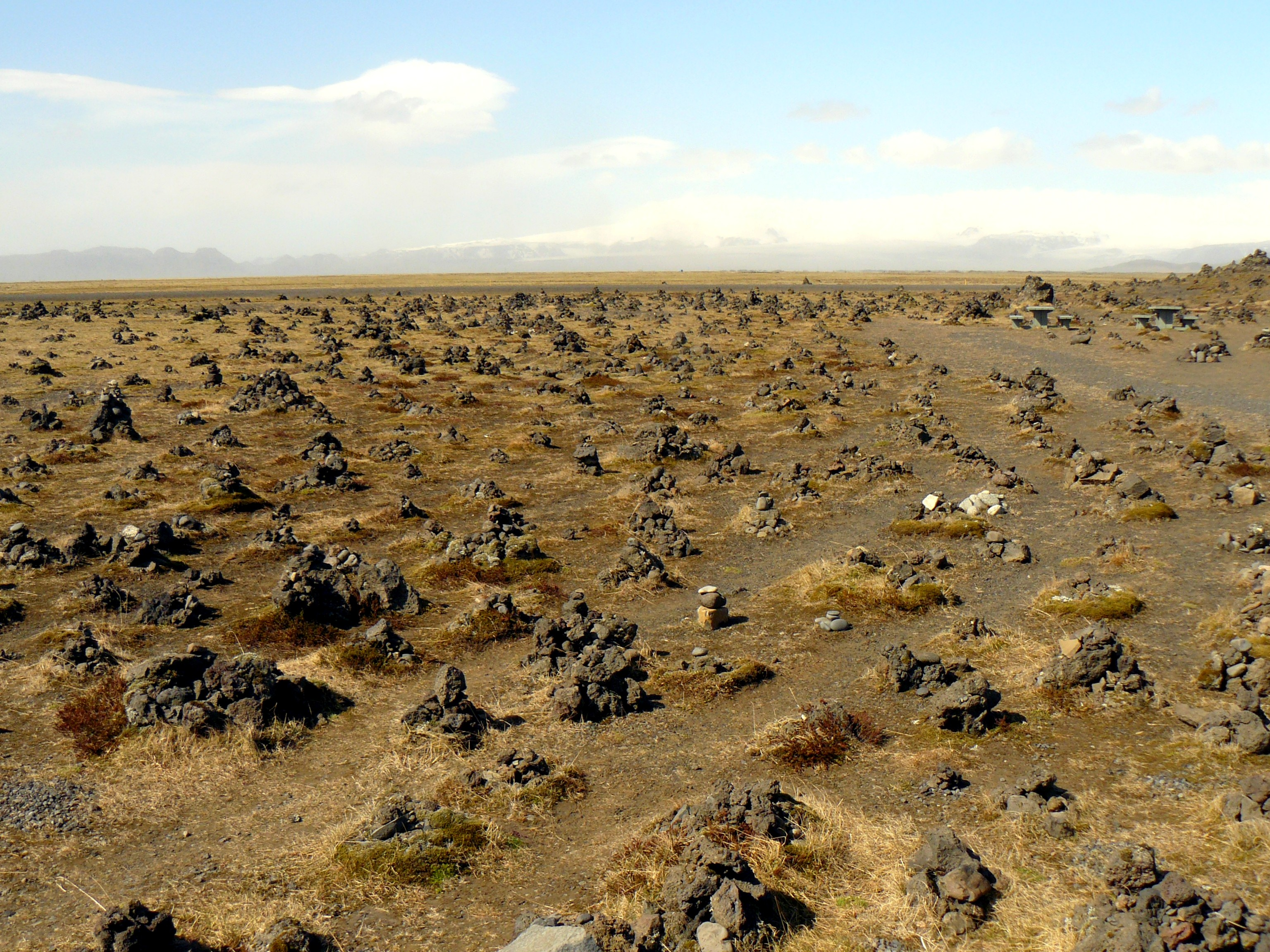 Le site historique de Laufskálavarða en Islande du Sud (ancienne ferme détruite par l'éruption du Katla en 894), et ses cairns